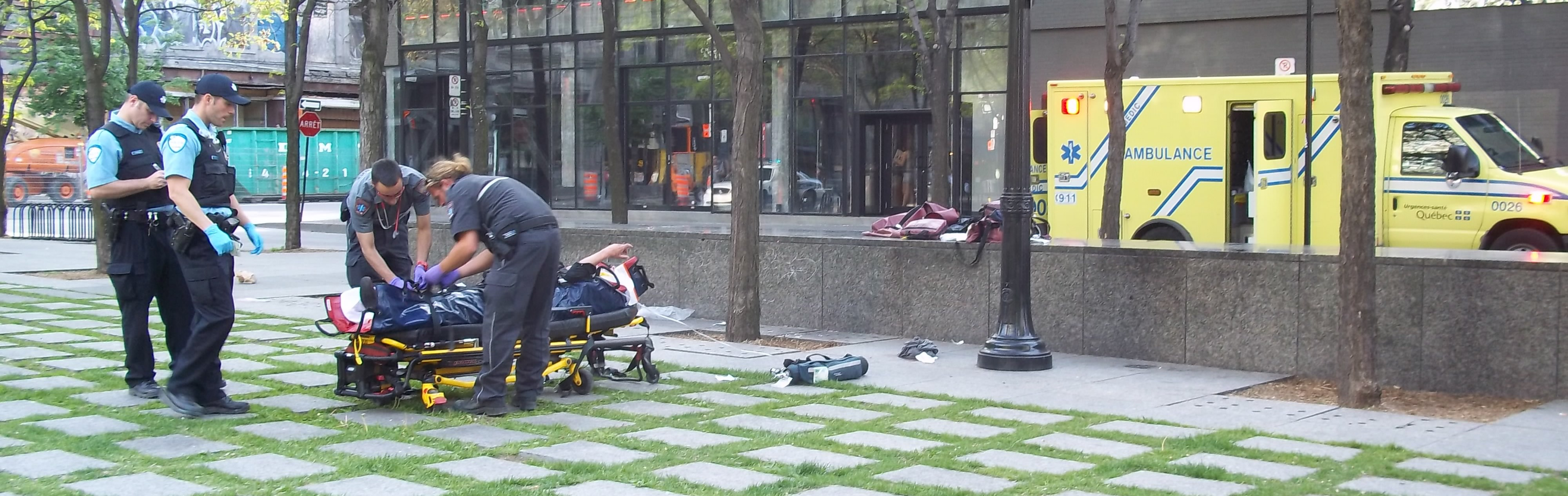 Place de la Paix, près du boulevard Saint-Laurent, Montréal Intervention d'Urgences-santé